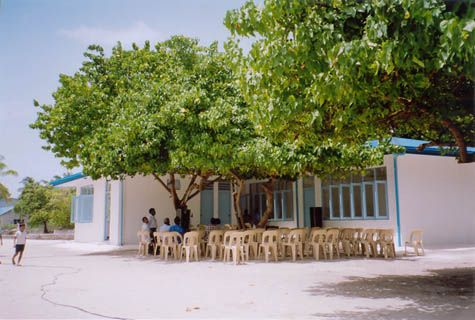 Kendhoo School auf den Malediven